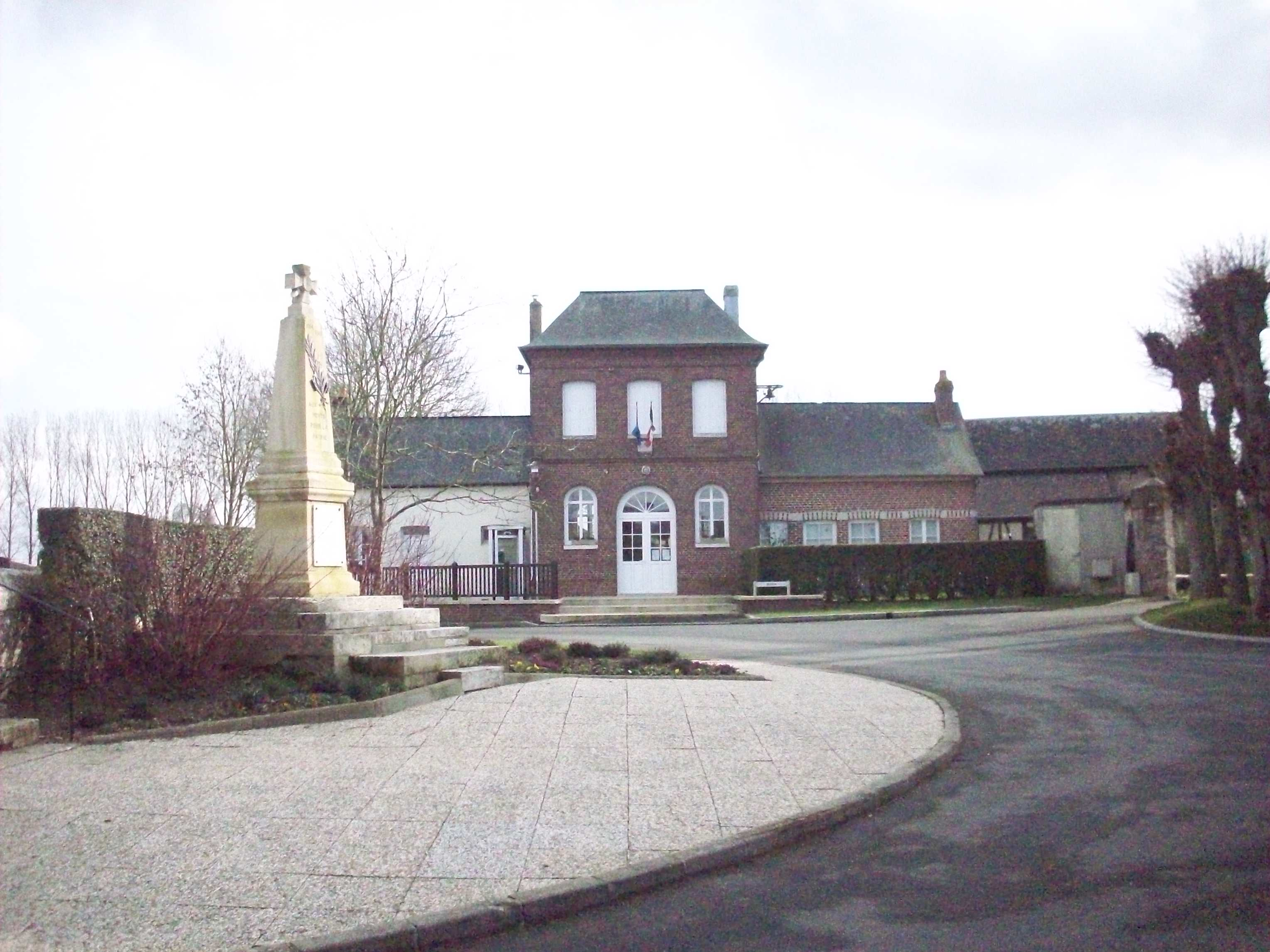 Mairie et monument aux morts de Fresne-le-Plan.